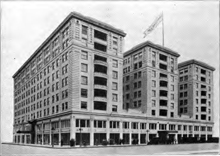 Multnomah_Hotel in Portland, Oregon circa 1920